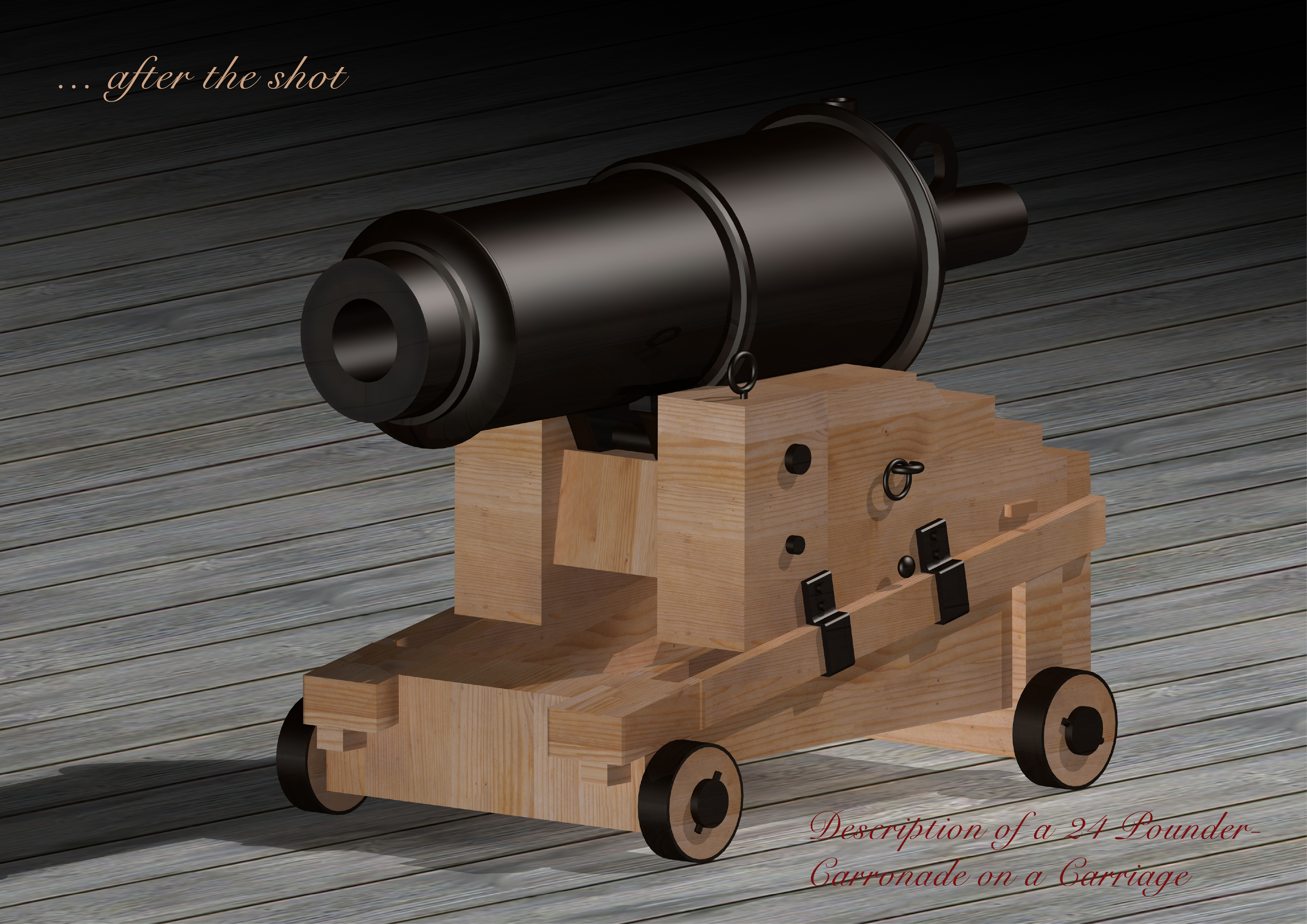 Darstellung einer 24 Pfund Carronade nach der original Zeichnung von Robert Melville - nach dem Schuss